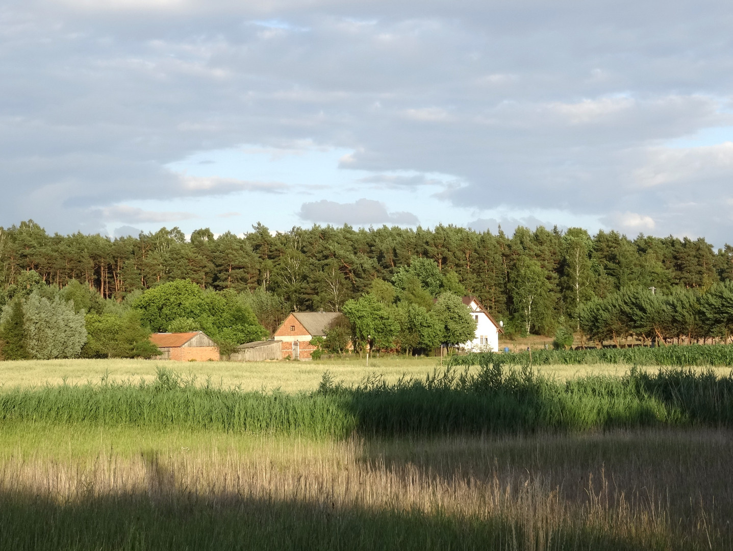 Położona w Puszczy Bydgoskiej wieś Leszyce, gmina Nowa Wieś Wielka, powiat bydgoski